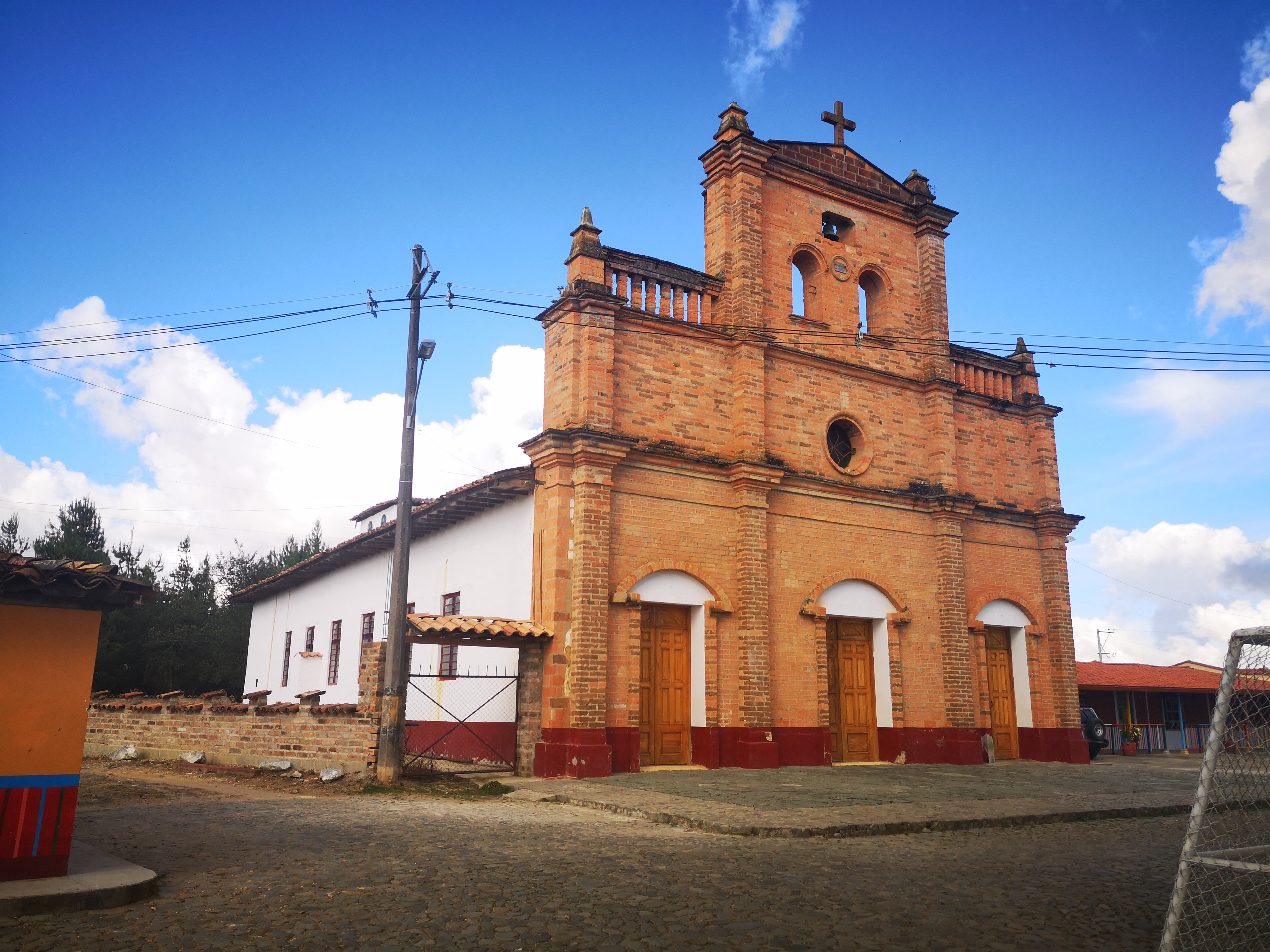 Hoyorrico